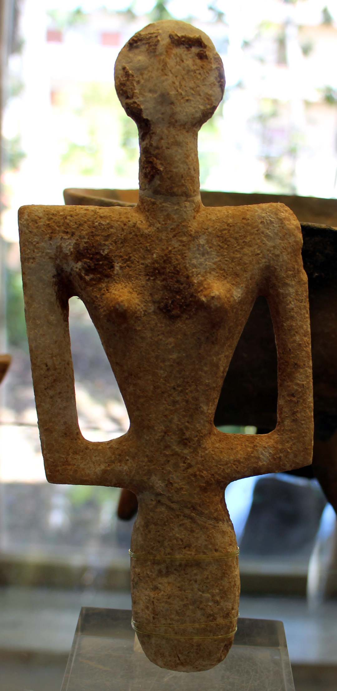 Museo archeologico nazionale G.A. Sanna - MIBAC The making of this document was supported by Wikimedia CH. (Submit your project!) For all the files concerned, please see the category Supported by Wikimedia CH. This is a photo of a monument which is part of cultural heritage of Italy.